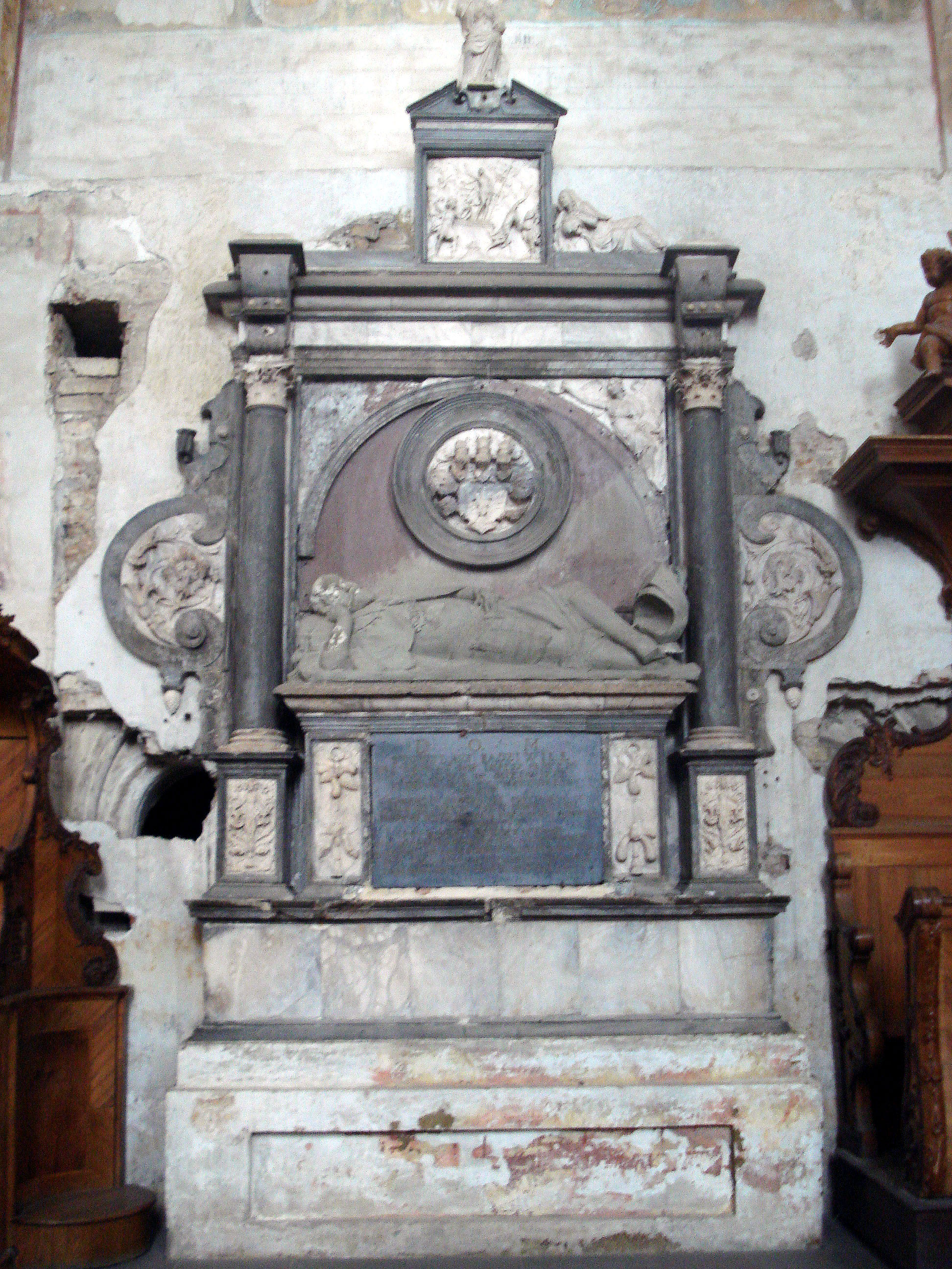 The Church of Saint Francis and Saint Bernardino in Vilnius (Šv. Pranciškaus ir Bernardino, arba Bernardinų, bažnyčia; Kościół Śww. Franciszka i Bernardyna; Maironio 10). Tombstone for Stanisław Radziwiłł (d. 1599). Created by Willem van den Blocke, Danzig, 1618-1623. Marmurinis renesansinis Stanislovo Radvilos Pamaldžiojo antkapis, seniausia Lietuvos profesionalioji apvaliosios skulptūros memorialinė kompozicija.